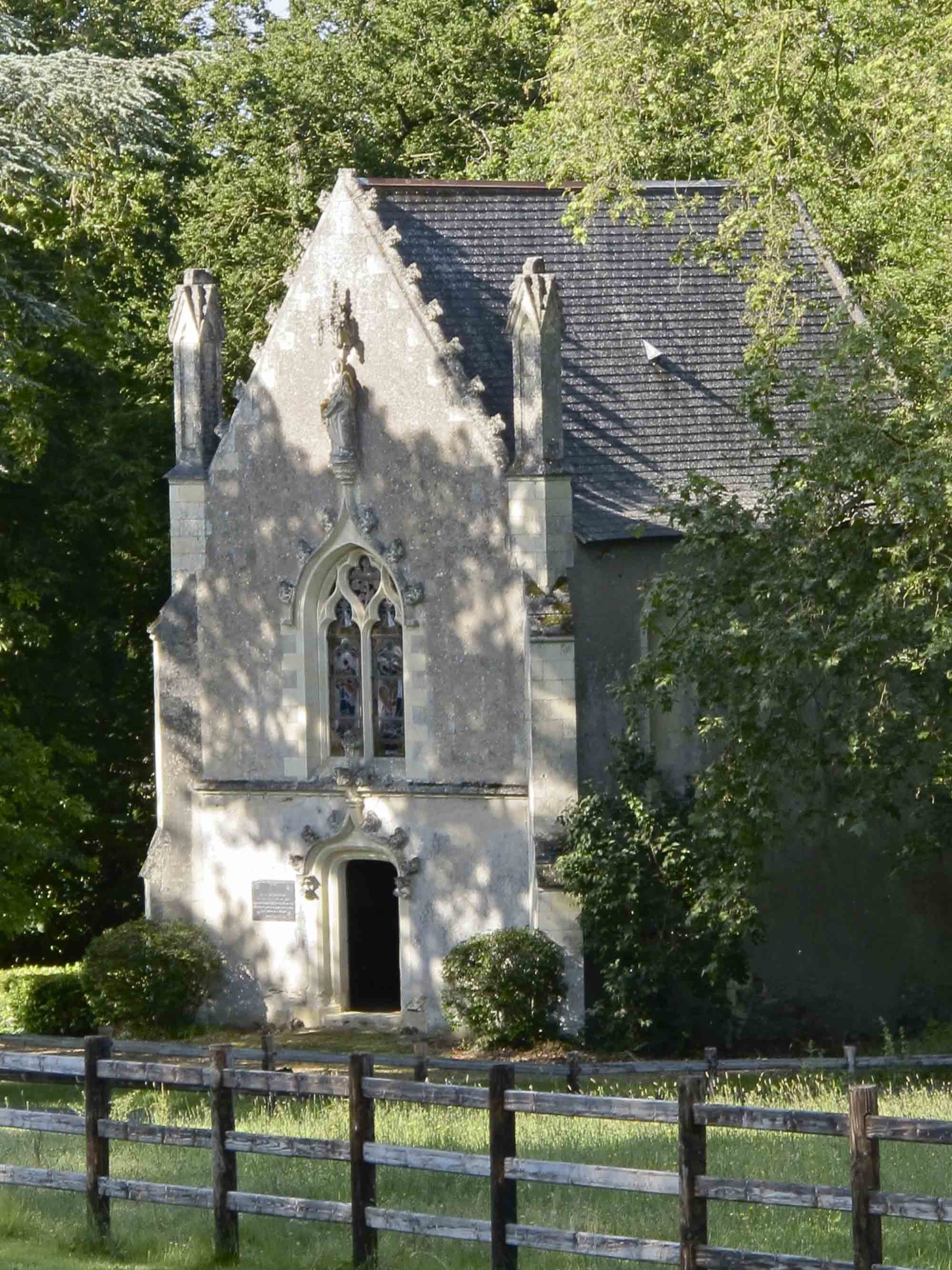 La chapelle de La Baronnière